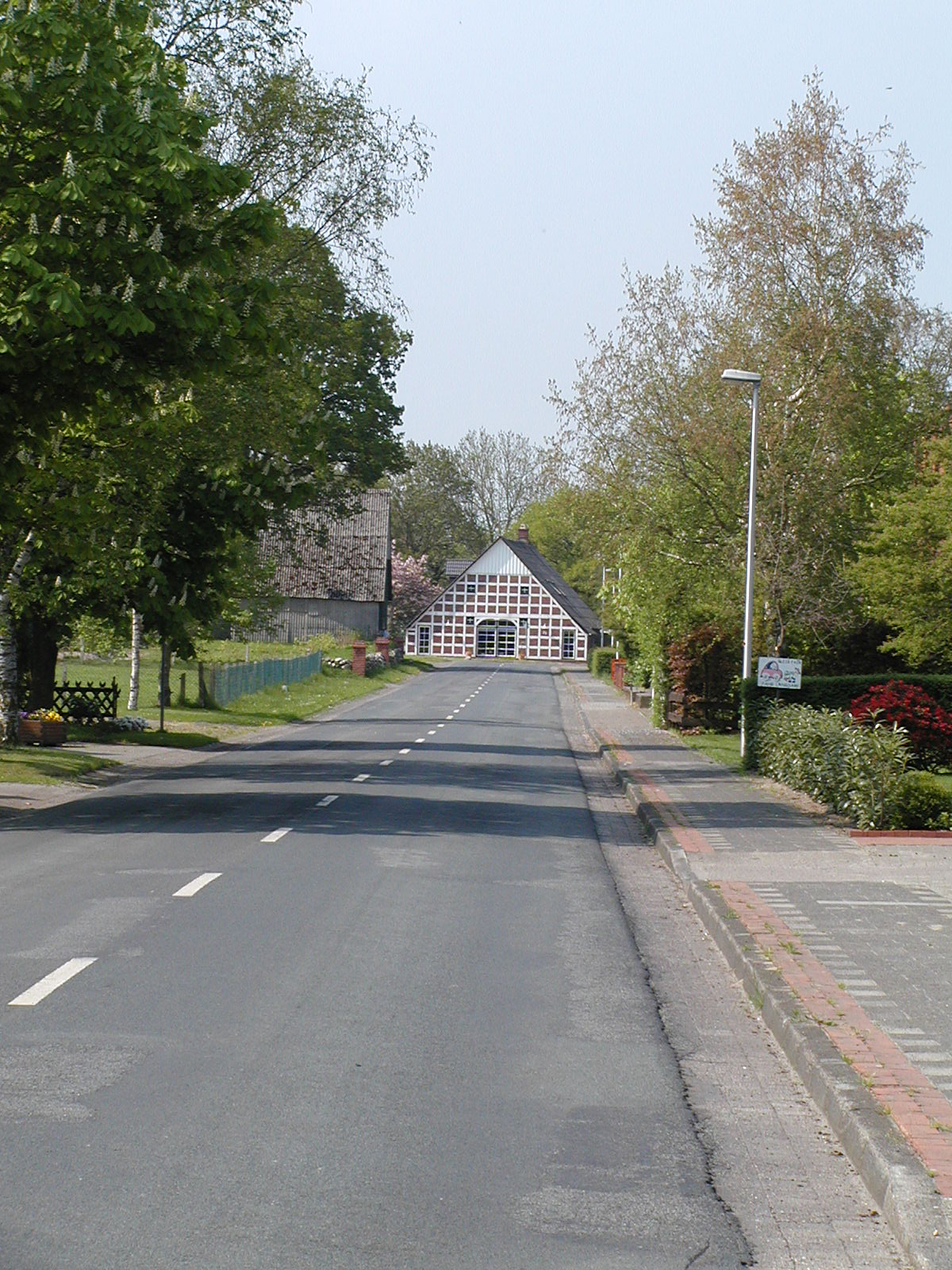 Die Hauptstraße in Stinstedt